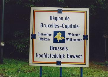 Ortsschild von Brüssel